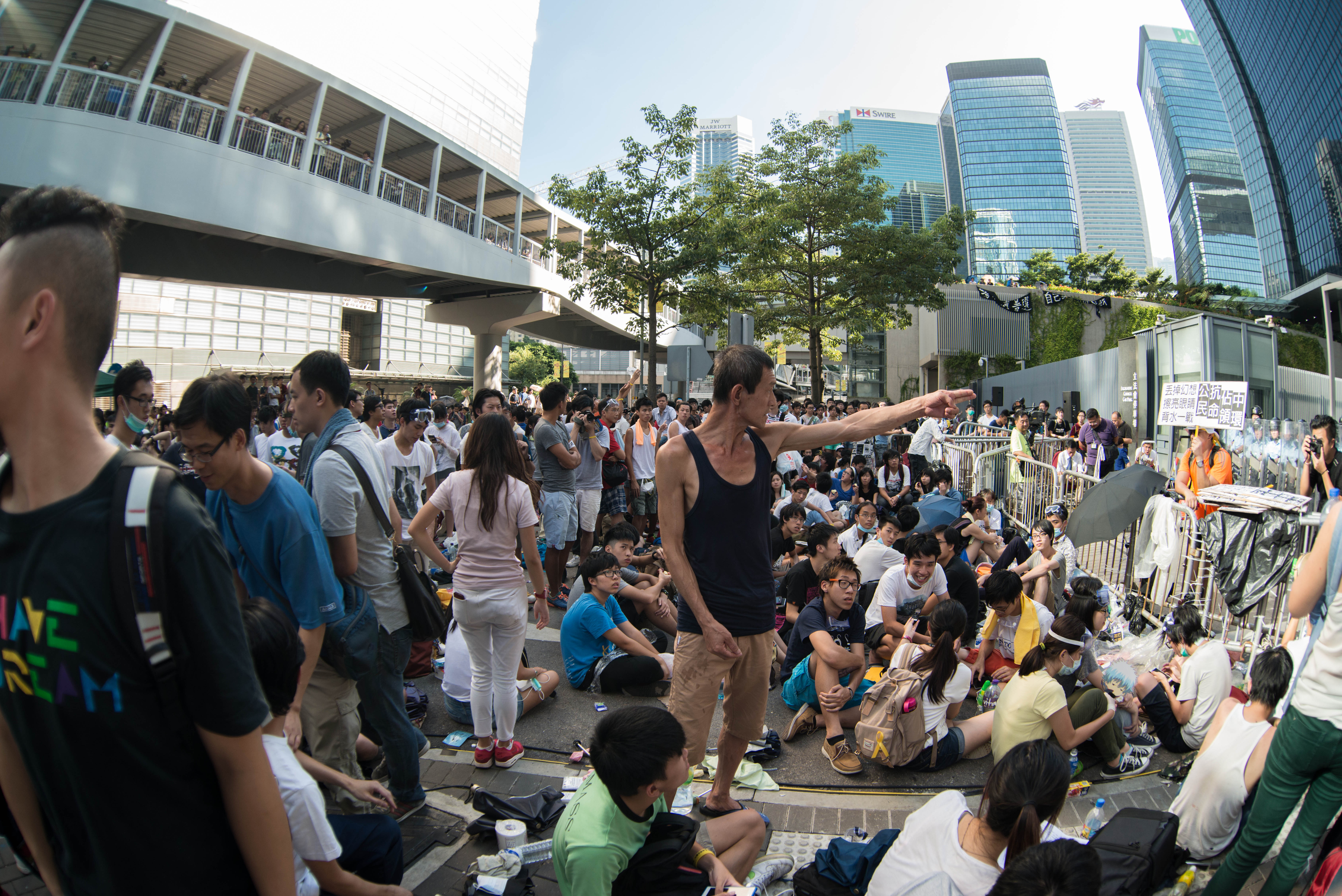 hong kong demands democracy 2014.09.27 2014.09.27 添美道